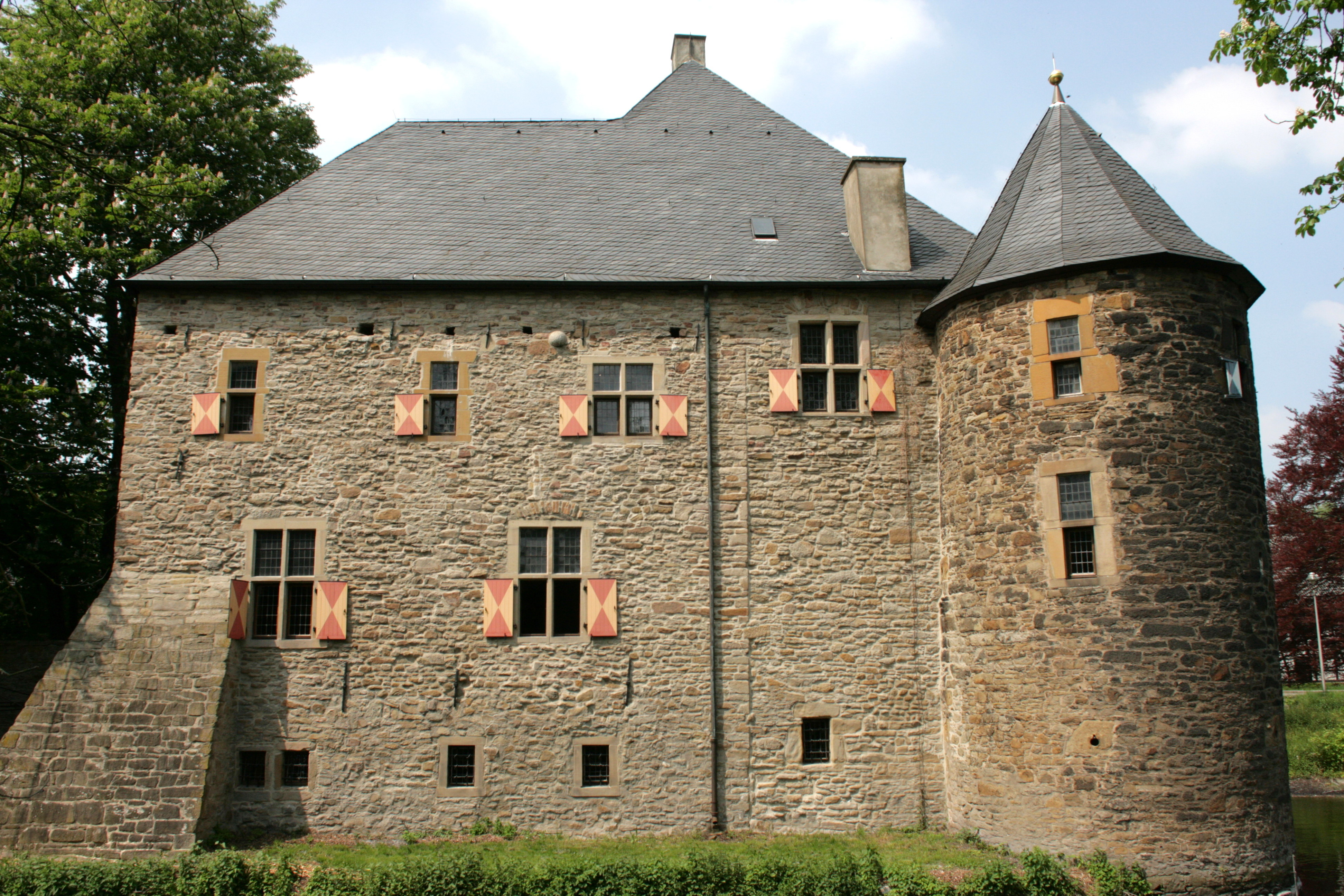 Haus Kemnade, An der Kemenade 10 in Hattingen-Blankenstein